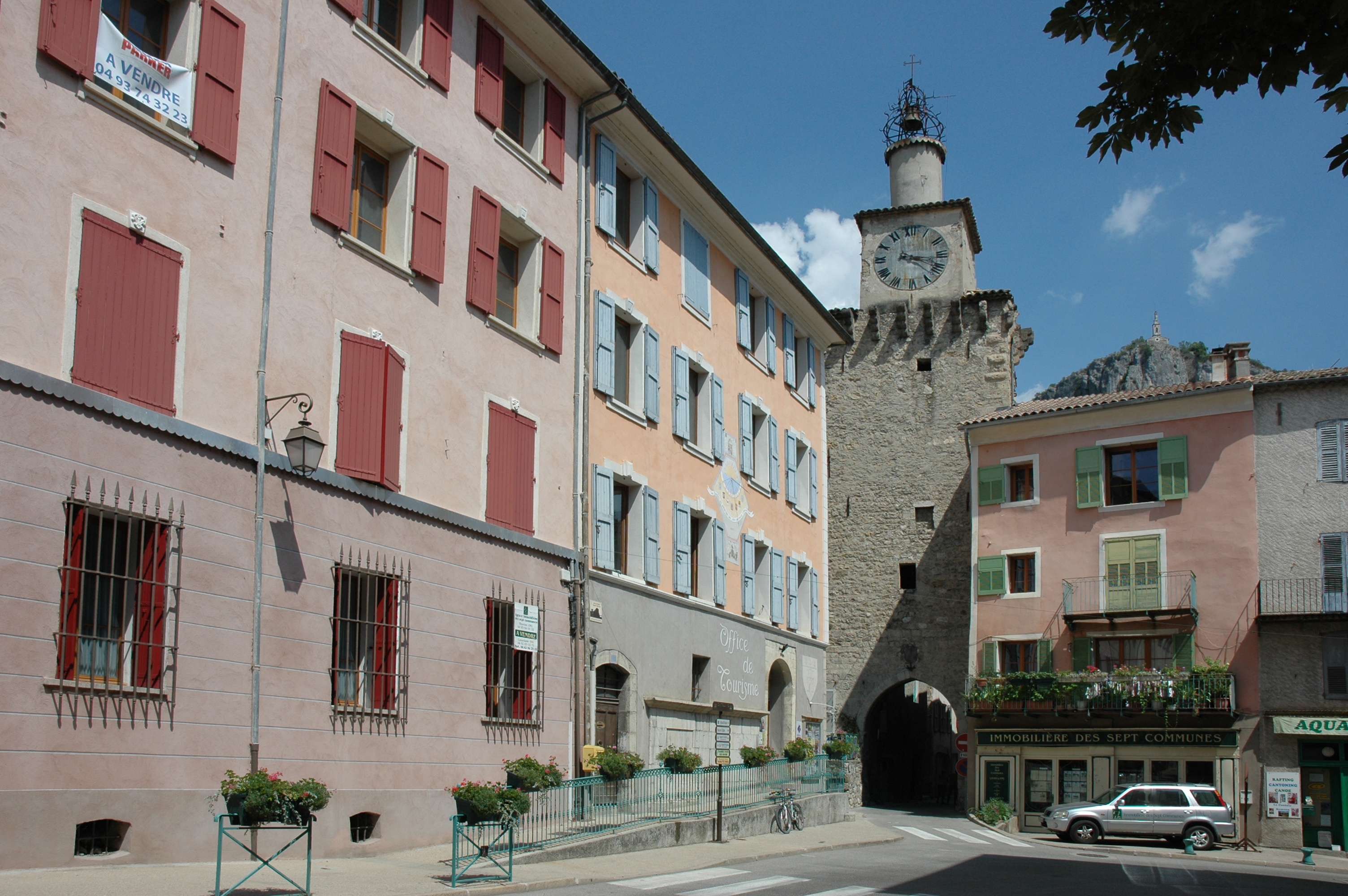 Tour de l'Horloge (Castellane)